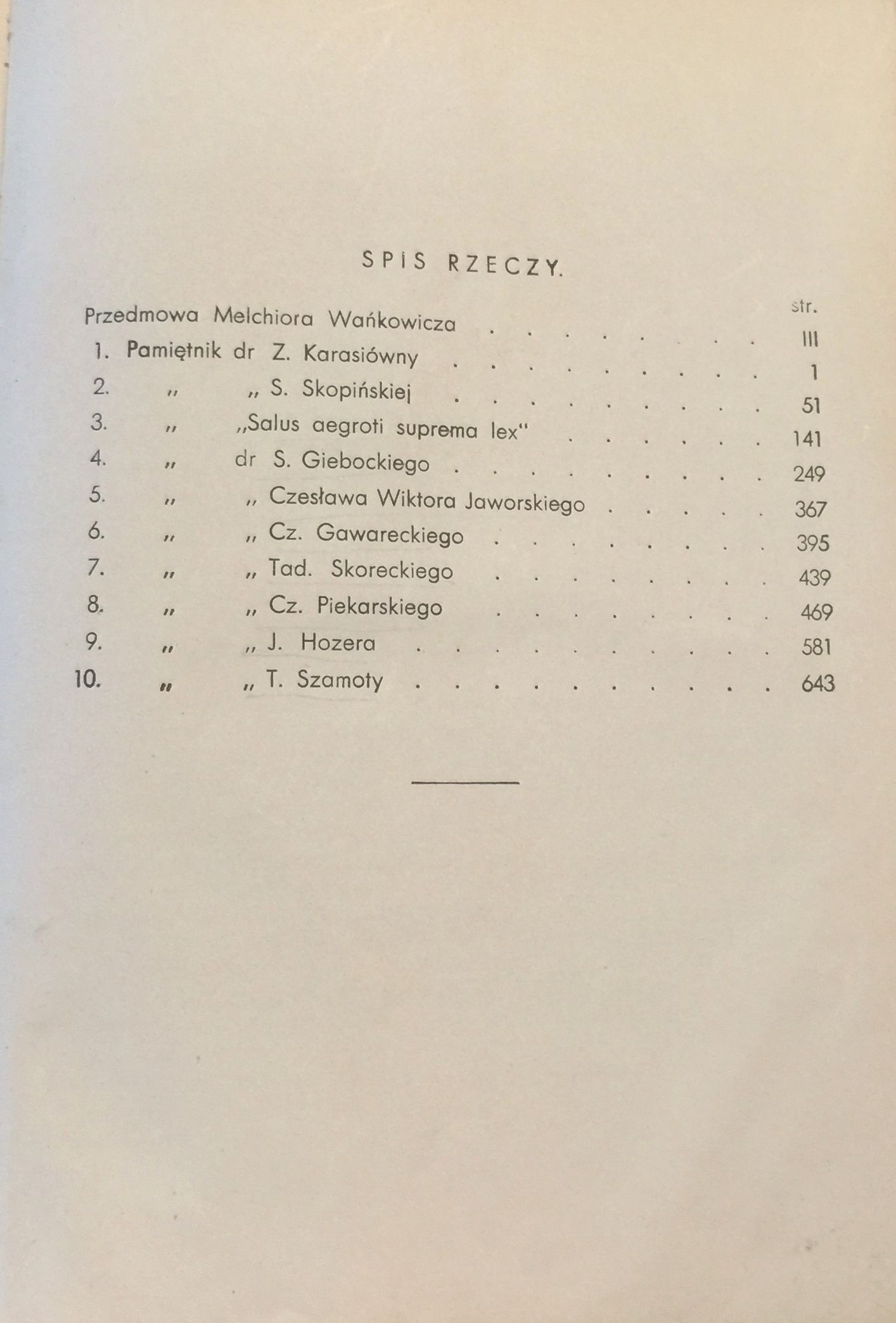 strona z książki PL: Pamiętniki lekarzy, wyd. III, Wydawnictwo Zakładu Ubezpieczeń Społecznych, Warszawa 1939.